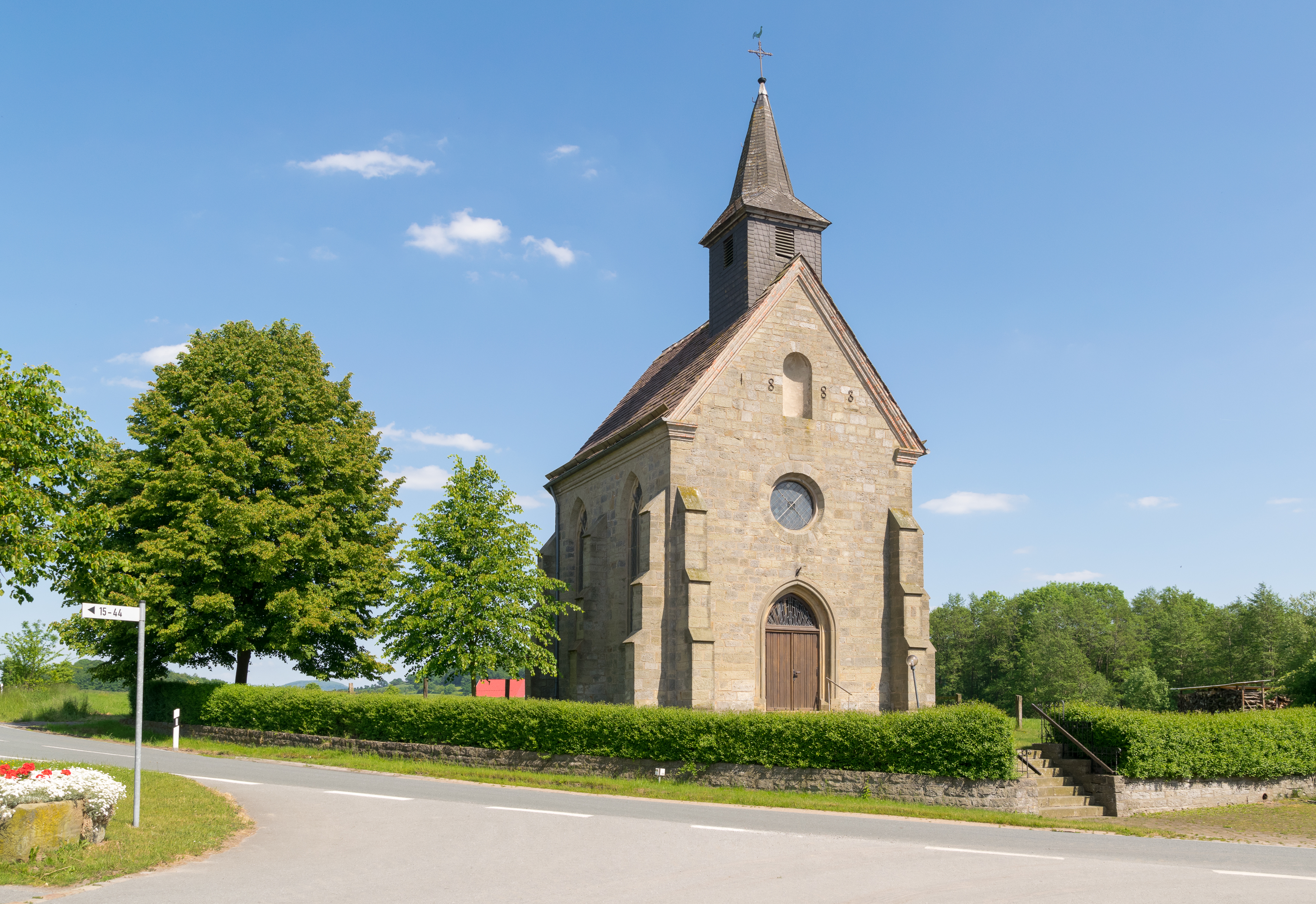 Kapelle in Marienmünster-Born, erbaut 1883-84